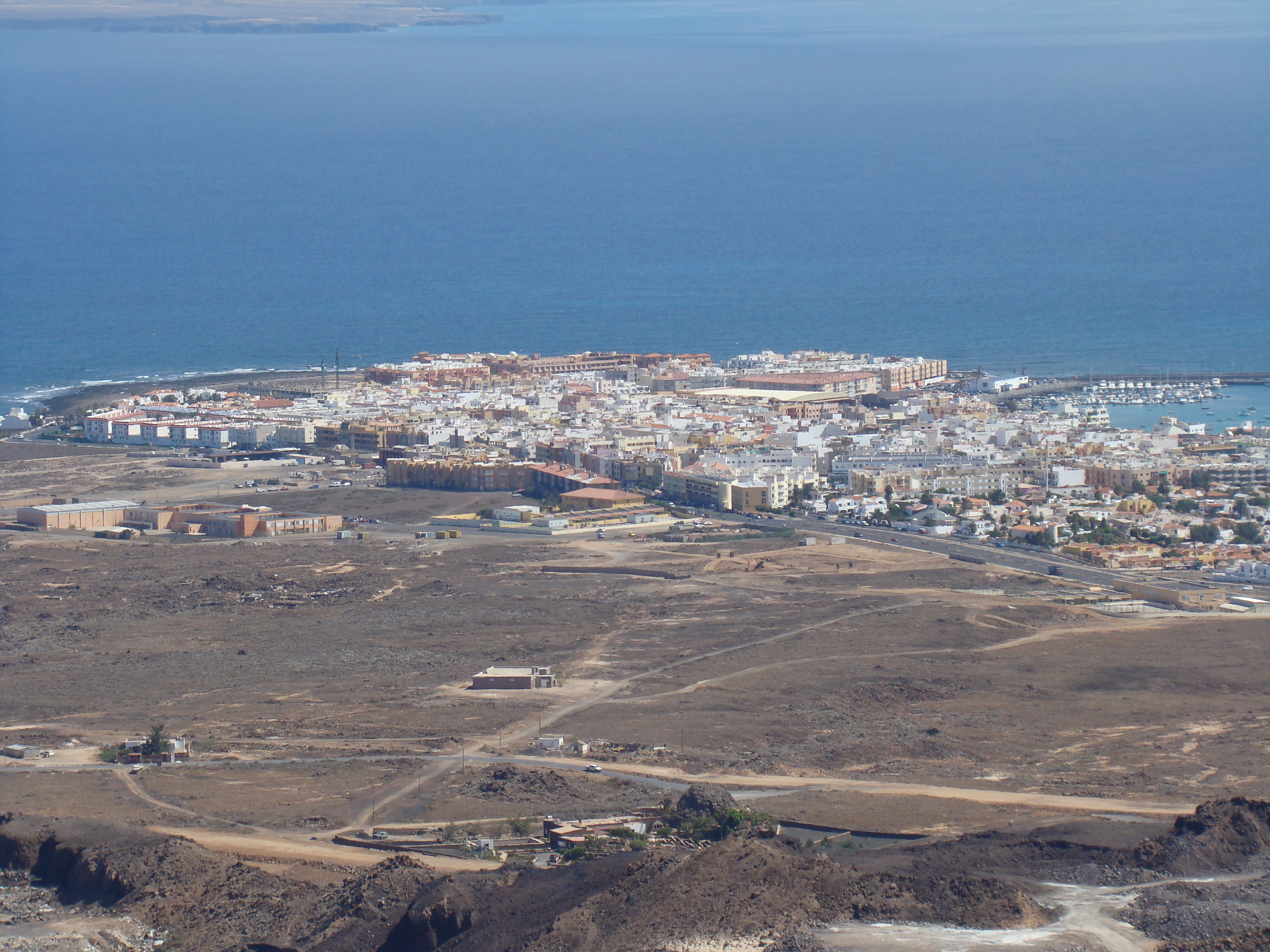 Corralejo from Bayuyo volcano